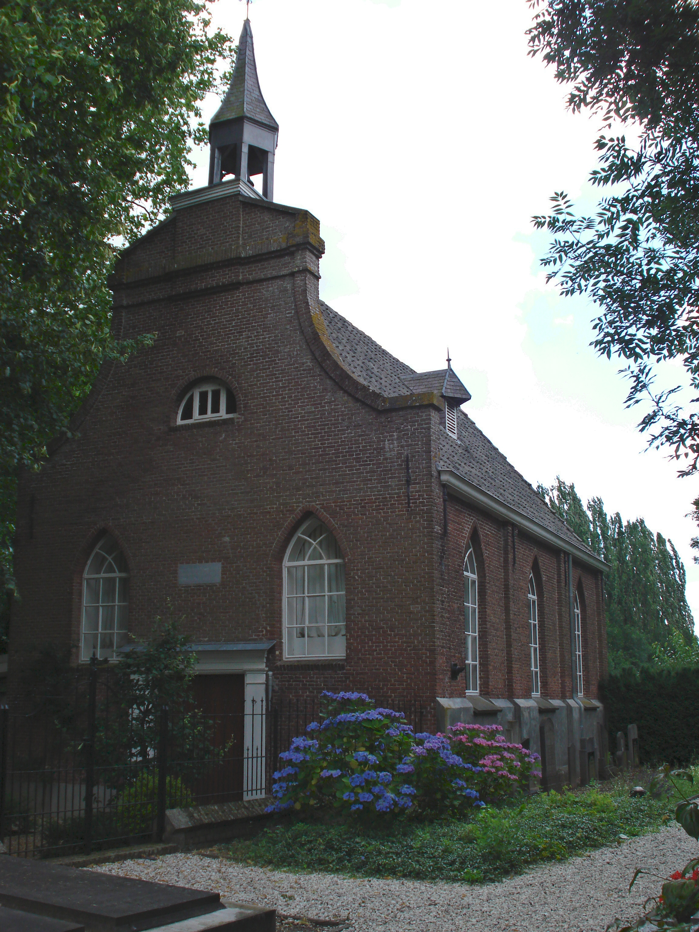 Oijen, le temple desaffecté